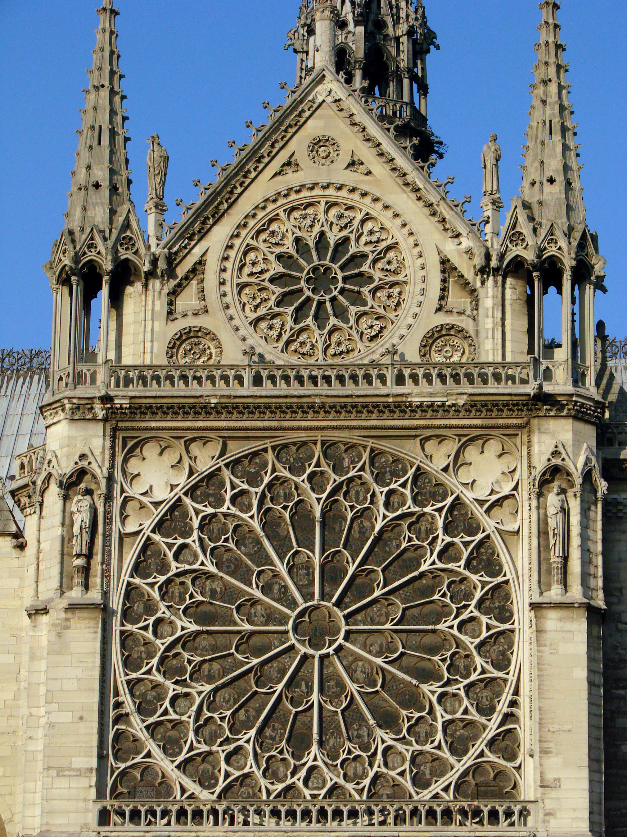 La grande rose du transept Sud de la cathédrale Notre-Dame de Paris.